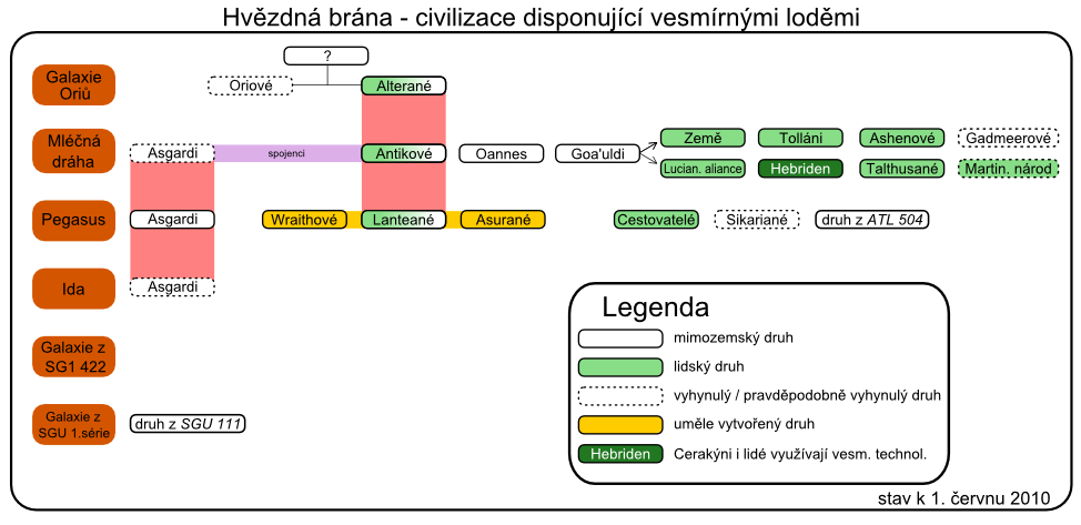 Tabulka civilizací z Hvězdné brány disponujích vesmírnými loděmi.